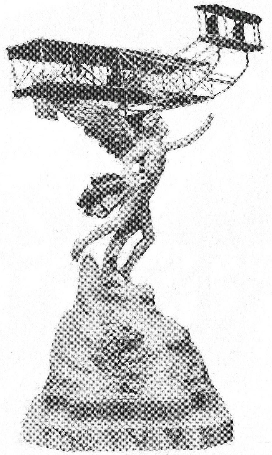 La coupe Gordon Bennet.